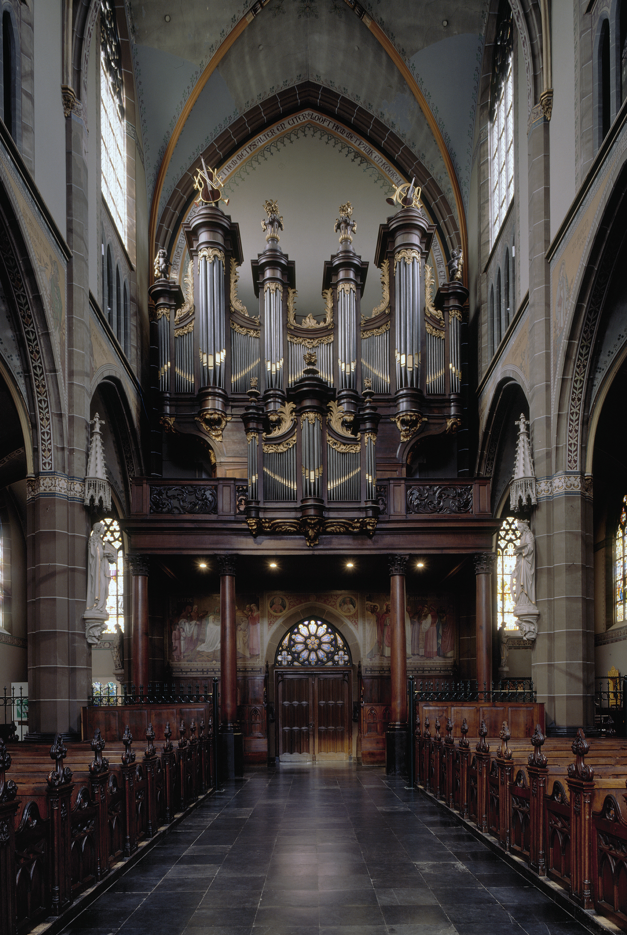 Sint Lambertuskerk: Interieur, overzicht van de westgevel met het orgel, orgelnummer 654 (opmerking: Gefotografeerd voor Het Historische Orgel in Nederland 1769-1790)